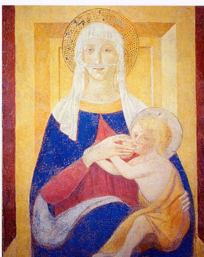 Pier Francesco Fiorentino, Madonna col Bambino (Madonna di Pancole), Santuario di Pancole, comune di San Gimignano (Siena)